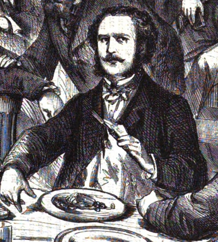 Gustav Richter, deutscher Maler im 19. Jh.